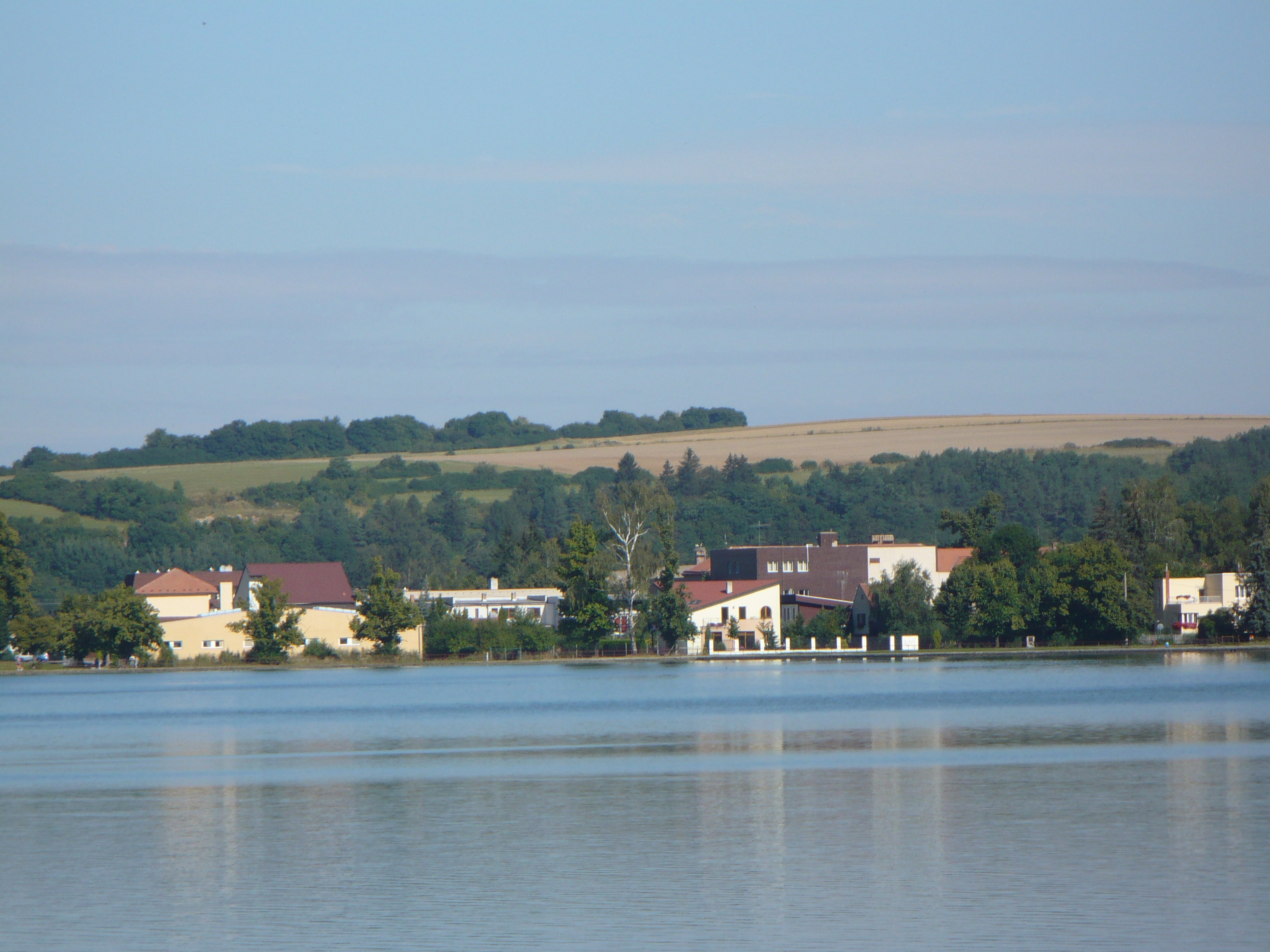 Rybník Olšovec v Jedovnici